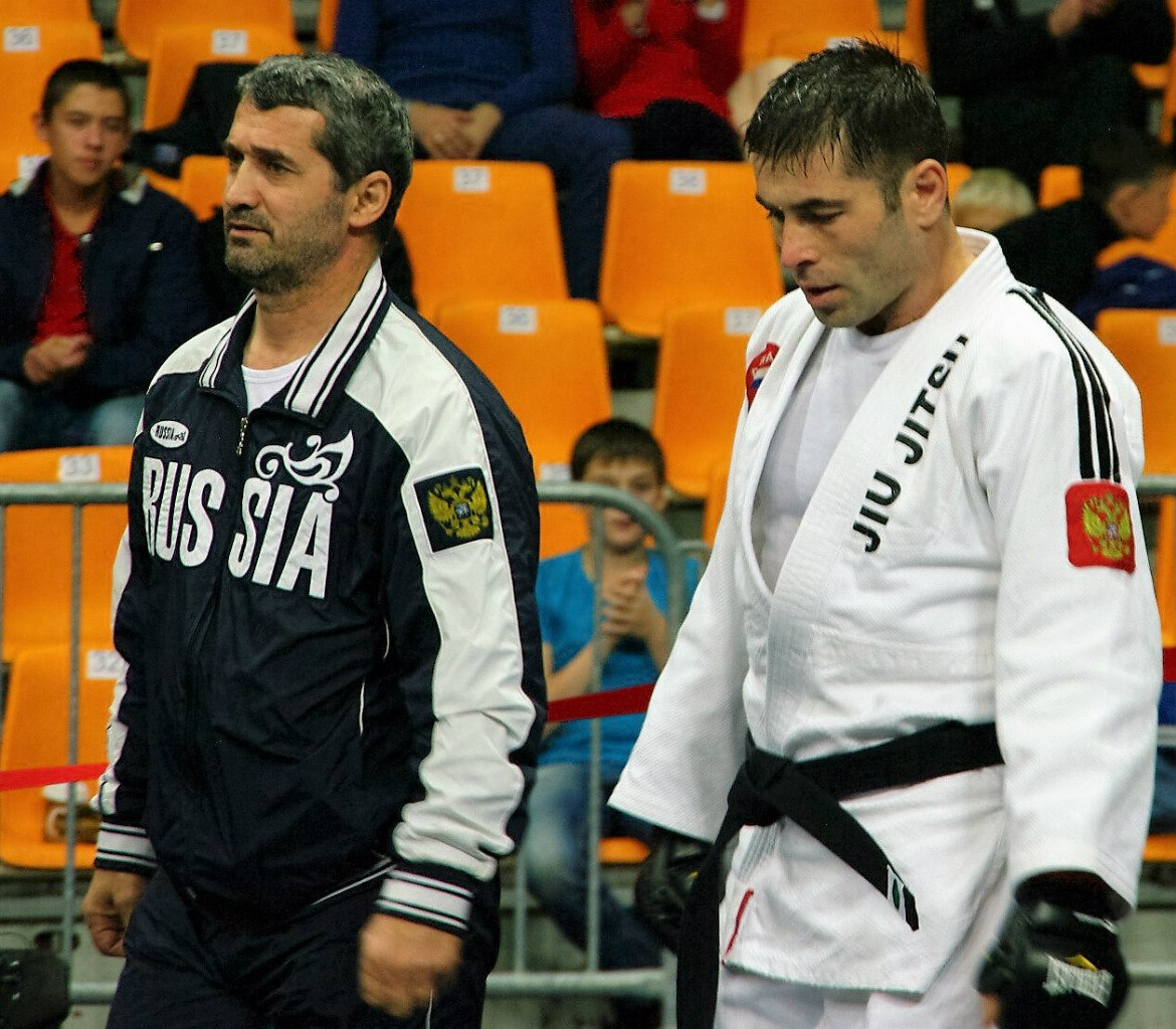 Москва "Лужники" (матчевая сборная России против сборной мира) боевое самбо.